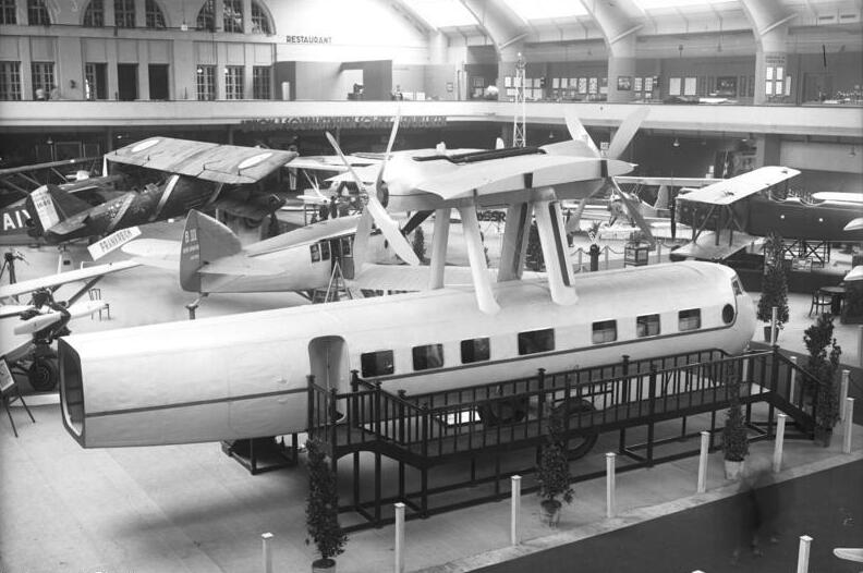 Die Eröffnung der II. Internationalen Luftfahrt -Ausstellung in den Ausstellungshallen am Kaiserdamm in Berlin1 Blick in die Halle der ausländischen Flugzeuge auf der "ILA". Im Vordergrund das neueste französische Farman-Gross-Flugzeug für mehr als 30 Passagiere eingereichtet.